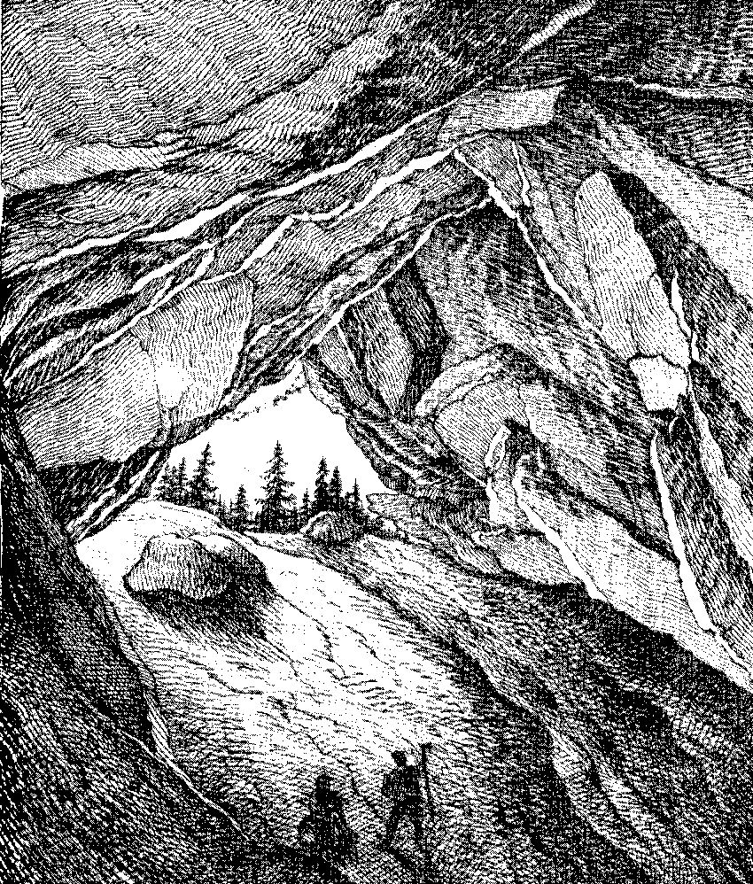 Litografia Stęczyńskiego z 1851 roku przedstawiająca Jaskinię Dziurę